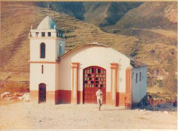 Foto tomada con una Zenith en el año 1985, en el Distrito de Paucartambo, Pasco, Perú.